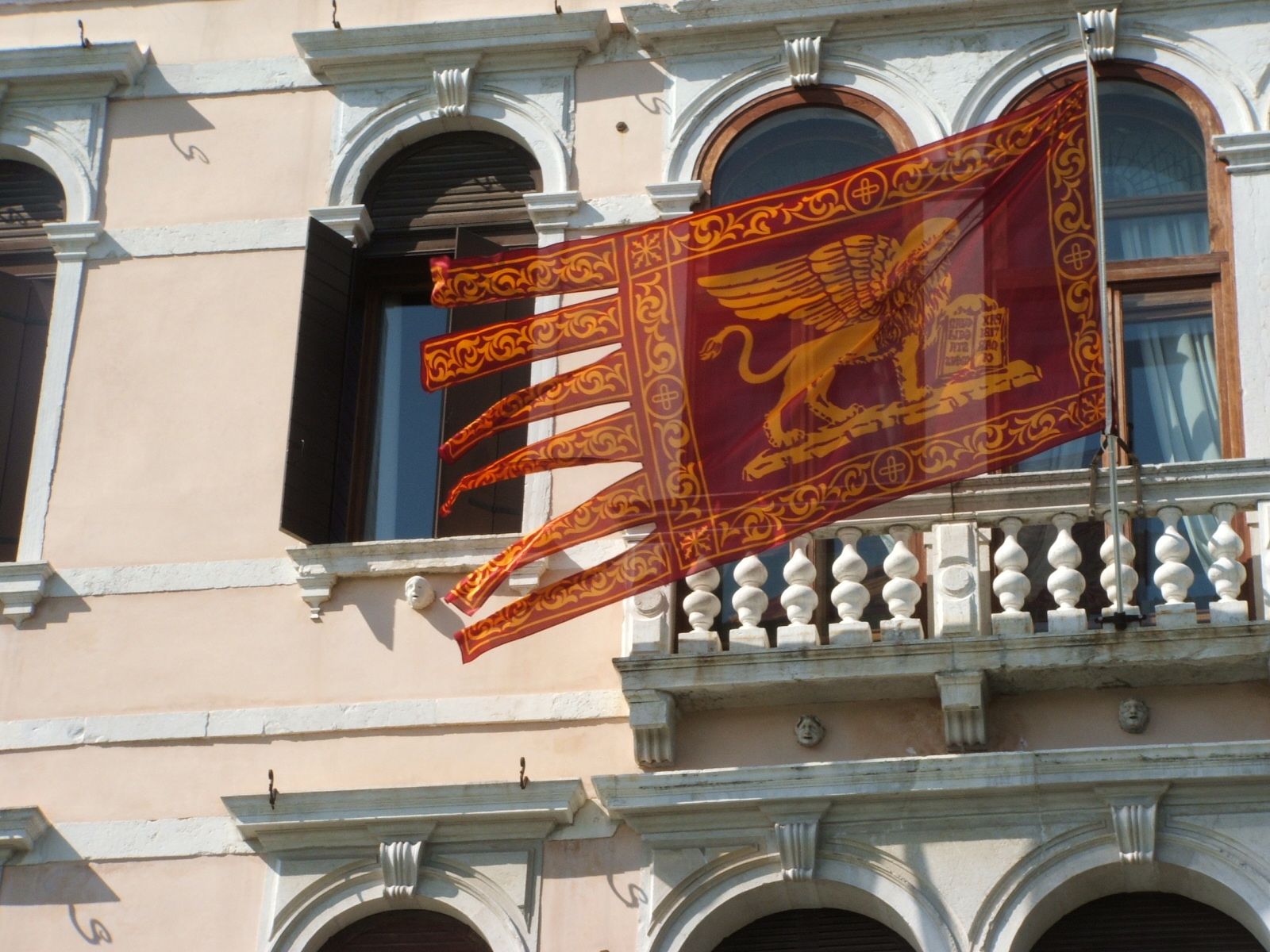 Venezia, stendardo della Serenissima Repubblica su un palazzo nel Canal Grande